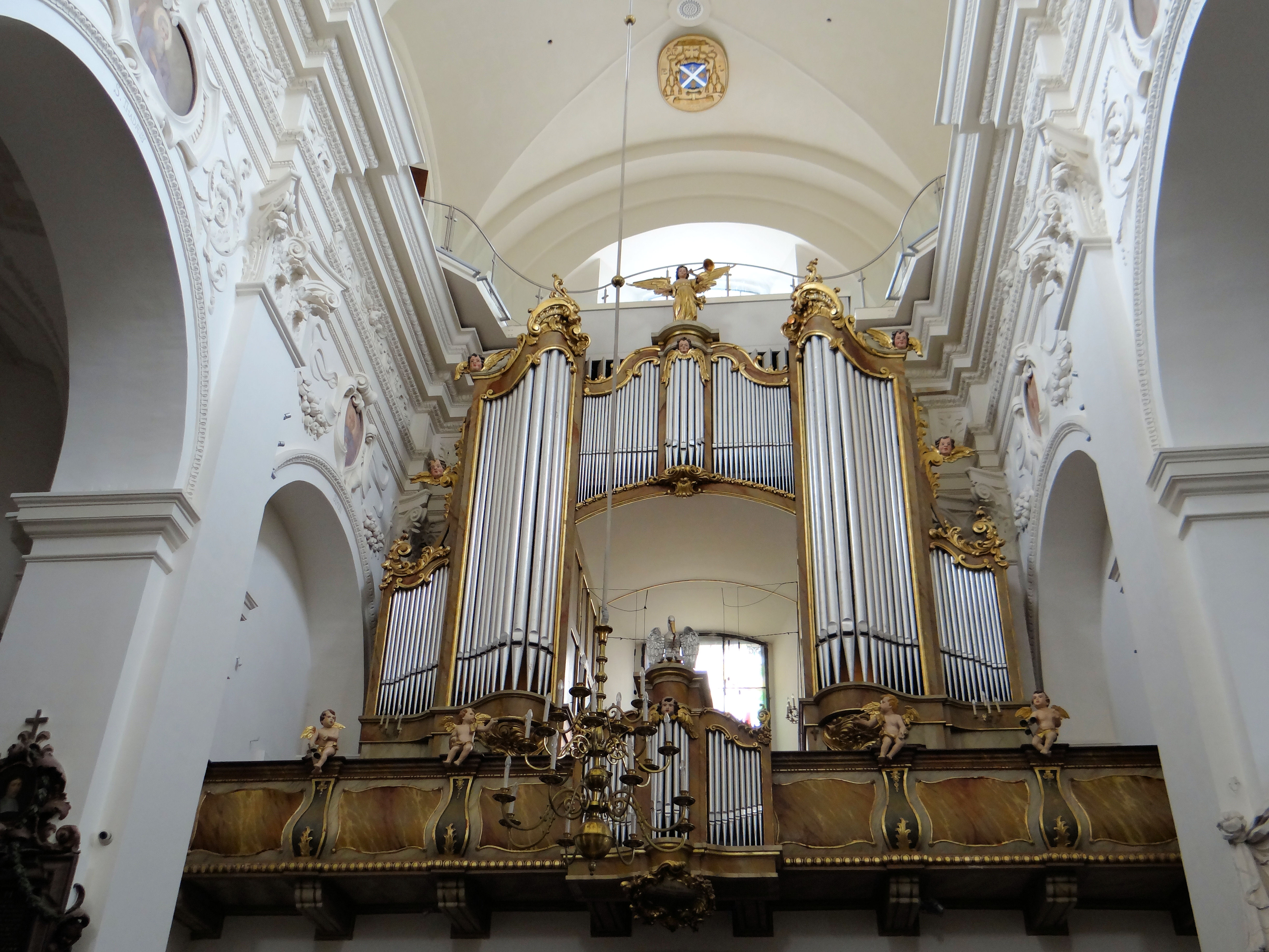 Bazylika Katedralna w Łowiczu - obecne organy są autorstwa Jana i Dariusza (syna) Zychów. Do ich budowy wykorzystano ocalałe z dawniejszych pożóg elementy starszych instrumentów. Konstrukcję wieńczy figura anioła grającego na trąbie.